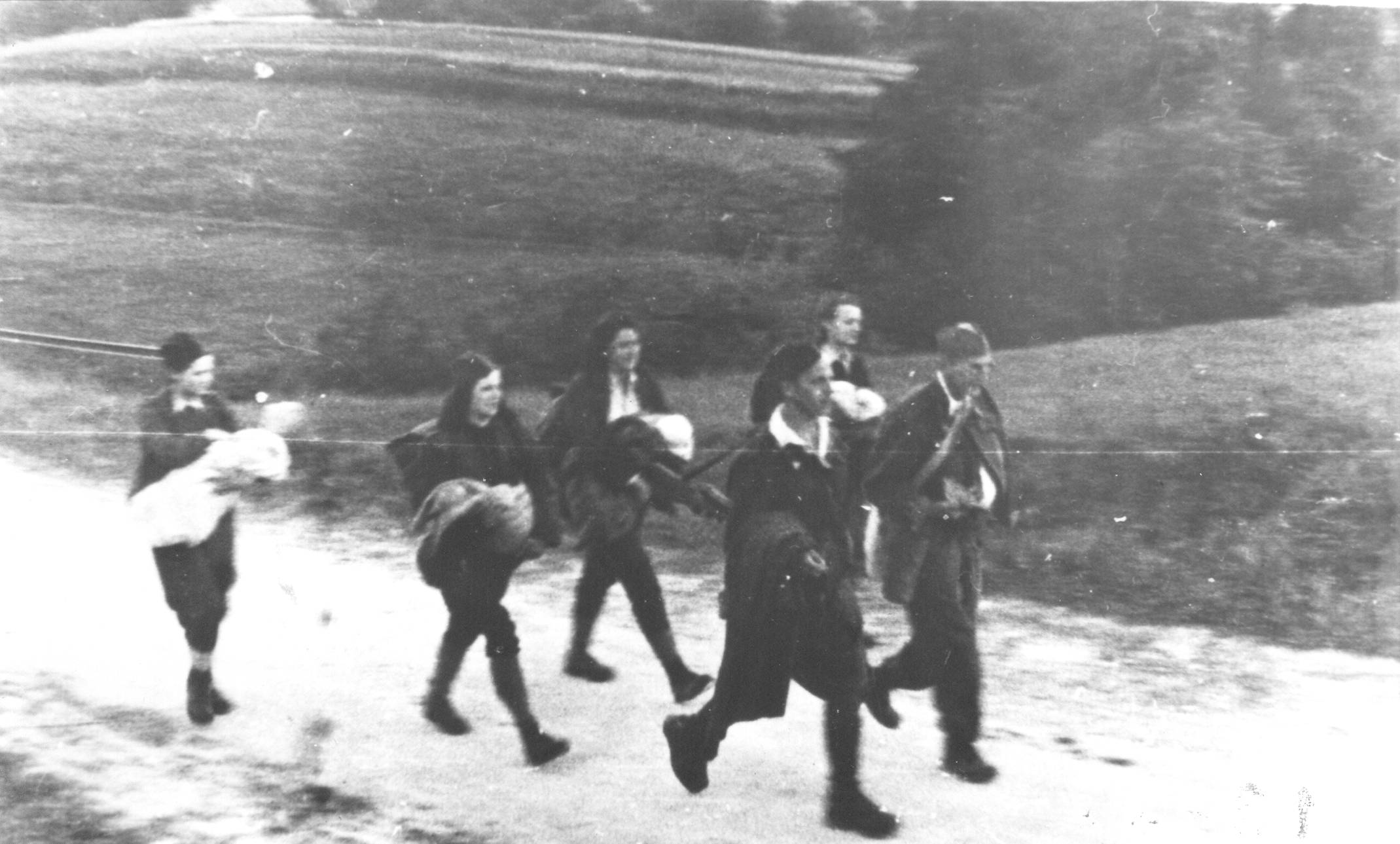 Evakuacija otrok iz partizanske porodnišnice